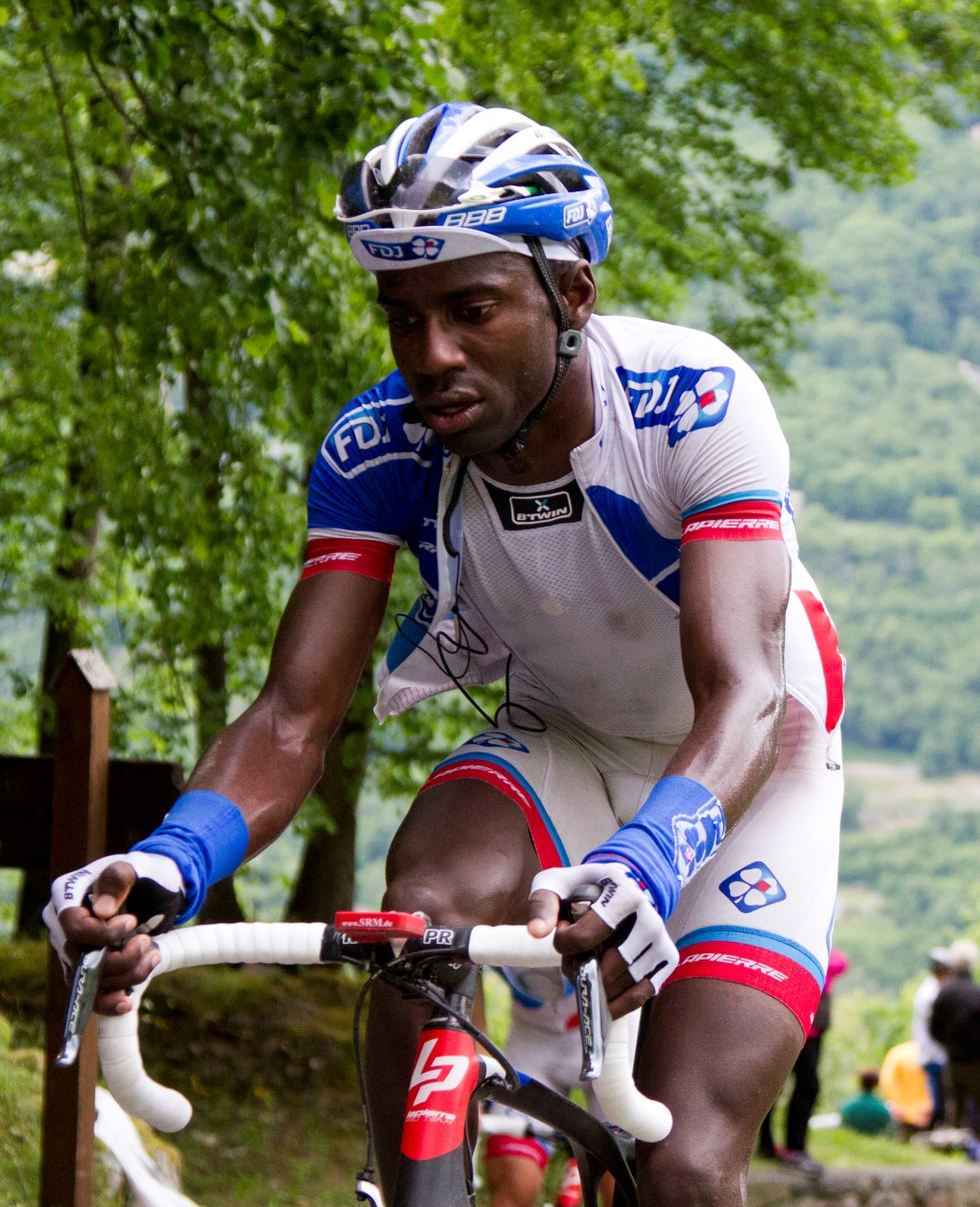 180 reza